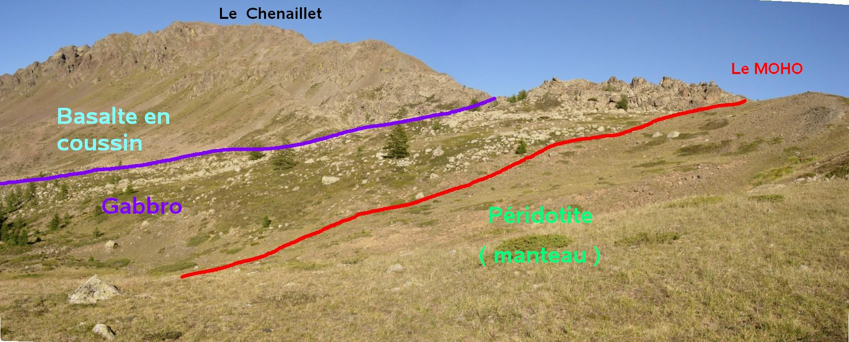 l'ophiloite du Chenaillet